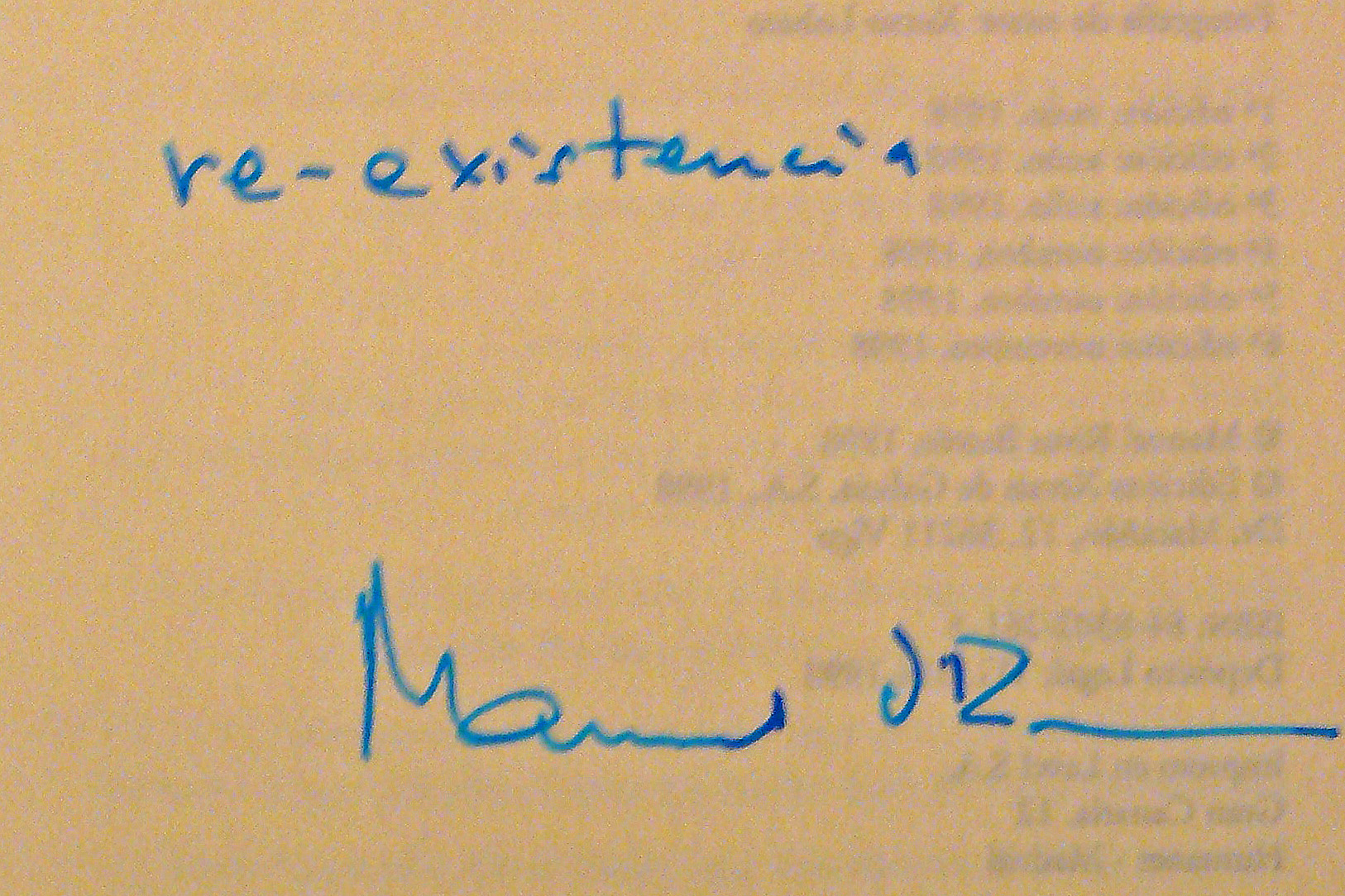 Adicatoria de Manuel Rivas